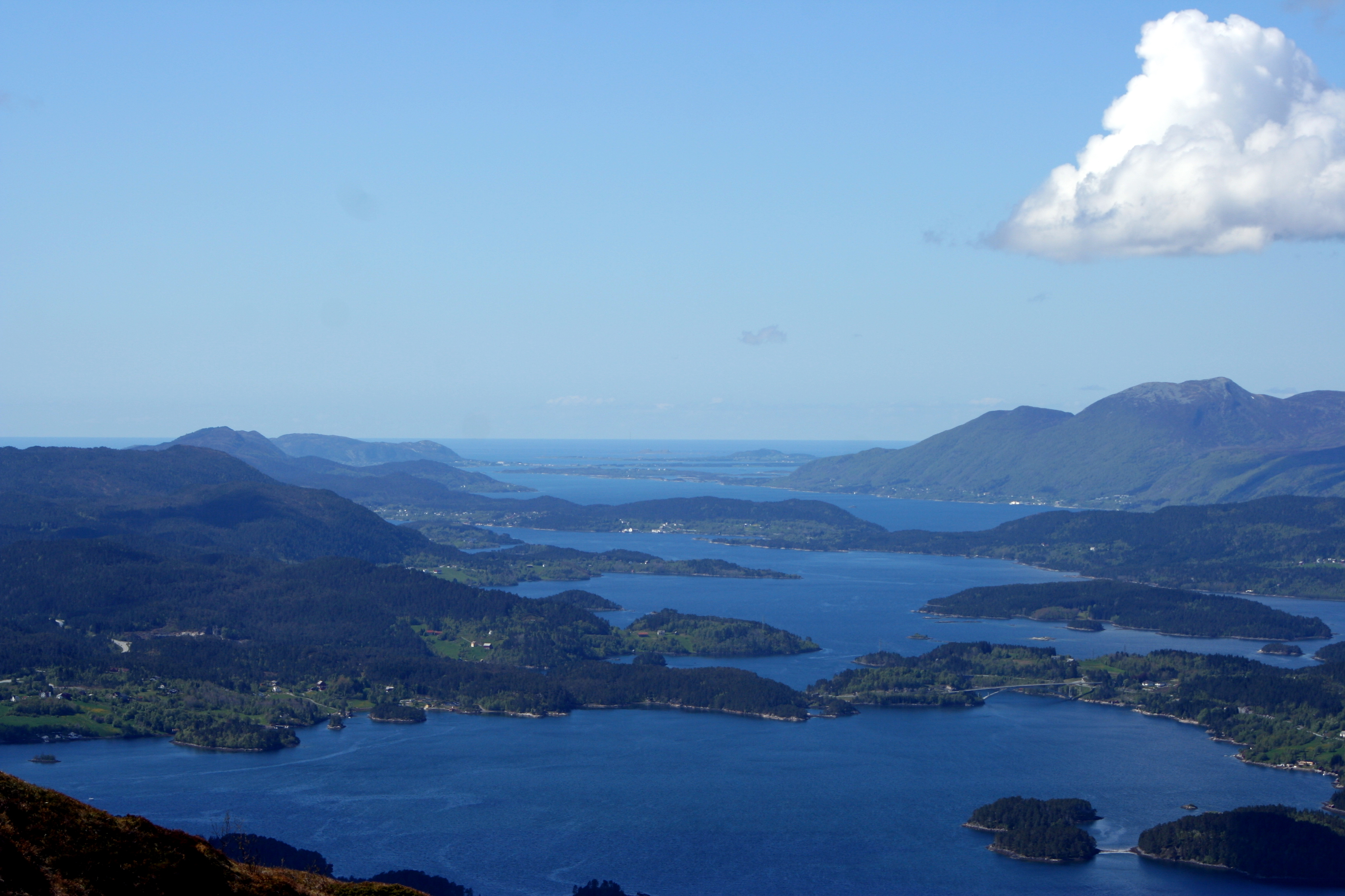 Ellingsøy